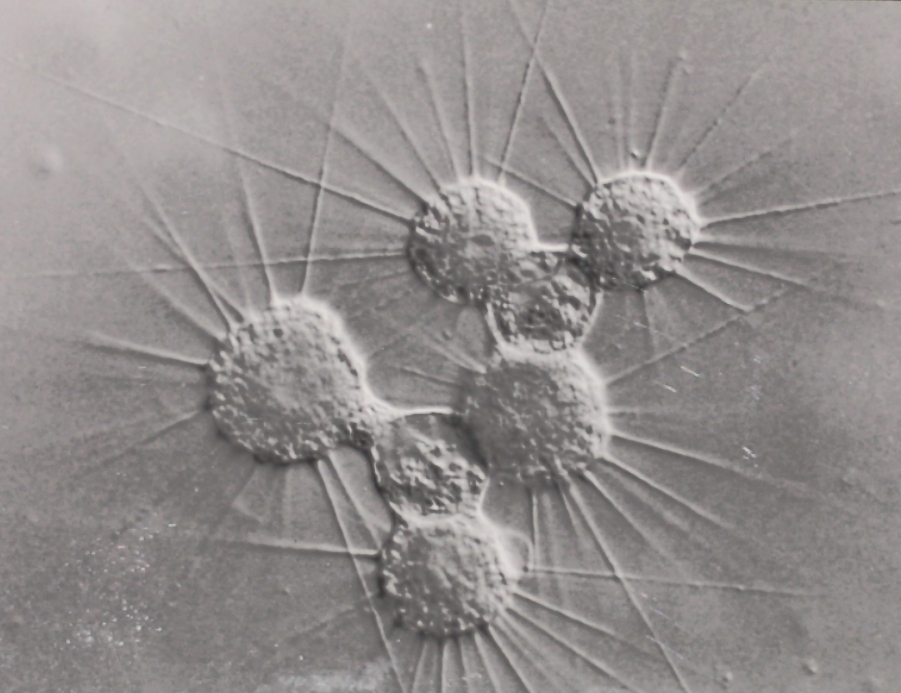 Heliozoen - Zellverband mit zwei gemeinsamen Nahrungsvakuolen. (Lichtmikroskopie, DIK - Differentialinterferenzkontrast)